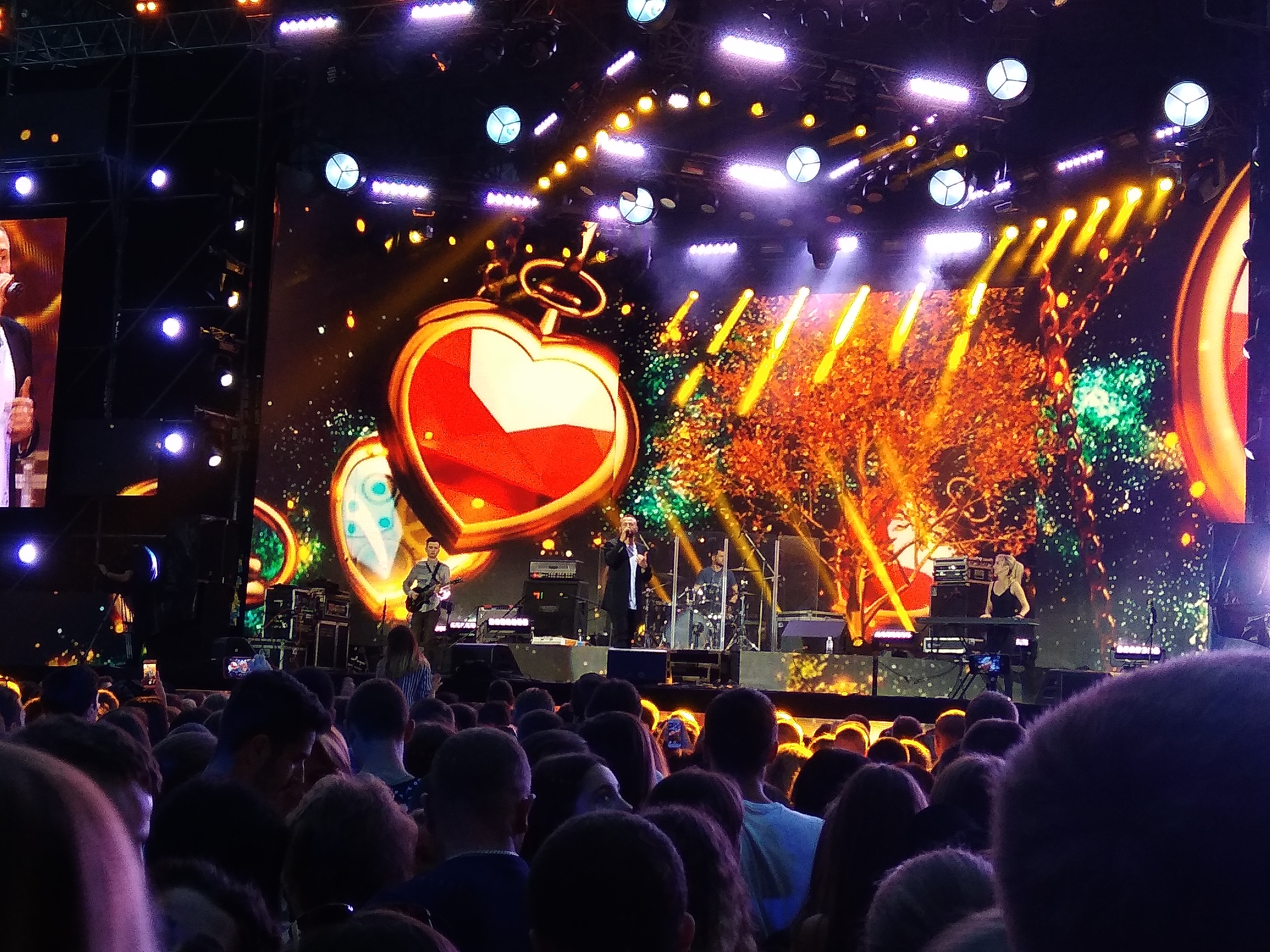 Українська пісня - Ukrainian Song Project музичний національний телепроект, фестиваль-концерт